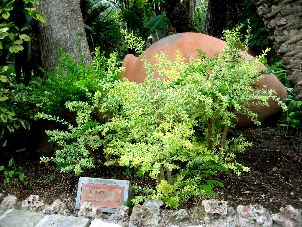 Myrtus tarentina en el Huerto del Cura. Probably the cultivar 'Microphylla Variegata'.